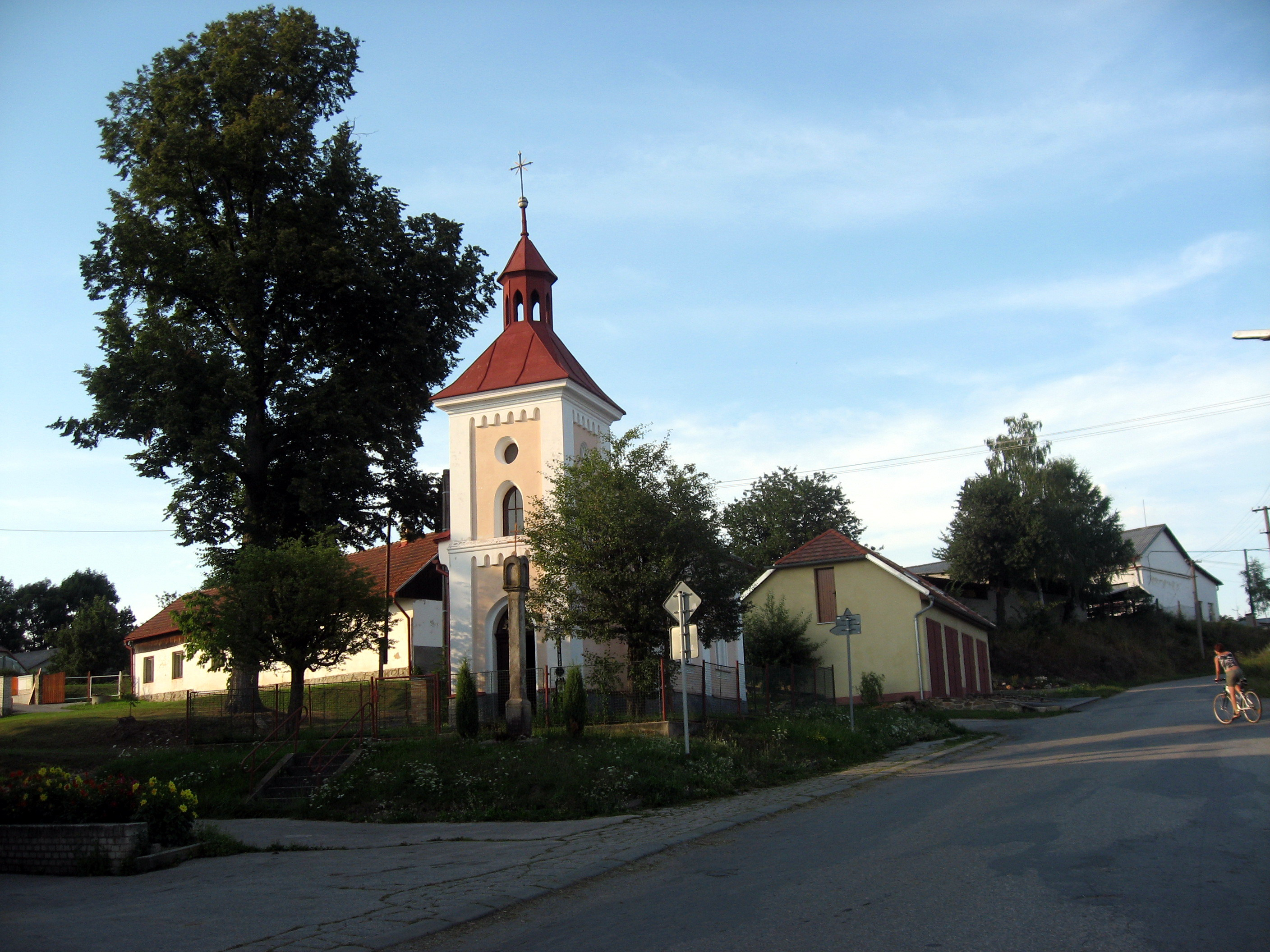 Kojčice, kaple